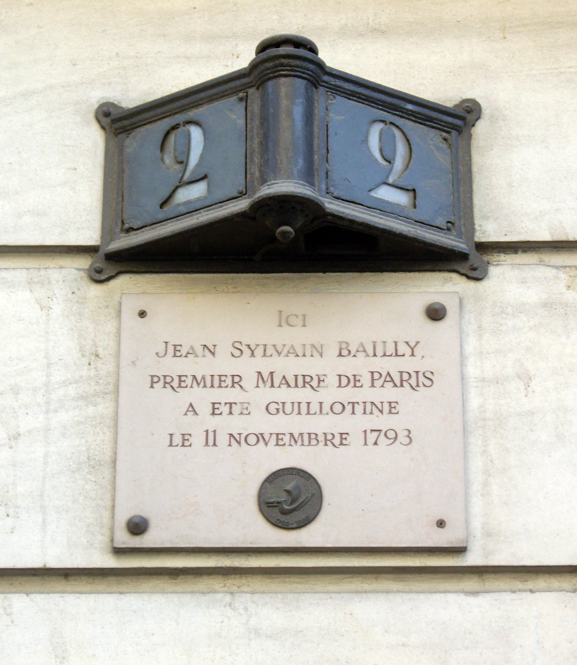 Plaque apposée au n° 2 de l'avenue de La Bourdonnais, Paris 7e, où fut guillotiné le premier maire de Paris, Jean Sylvain Bailly (1736-1793), le 11 novembre 1793.